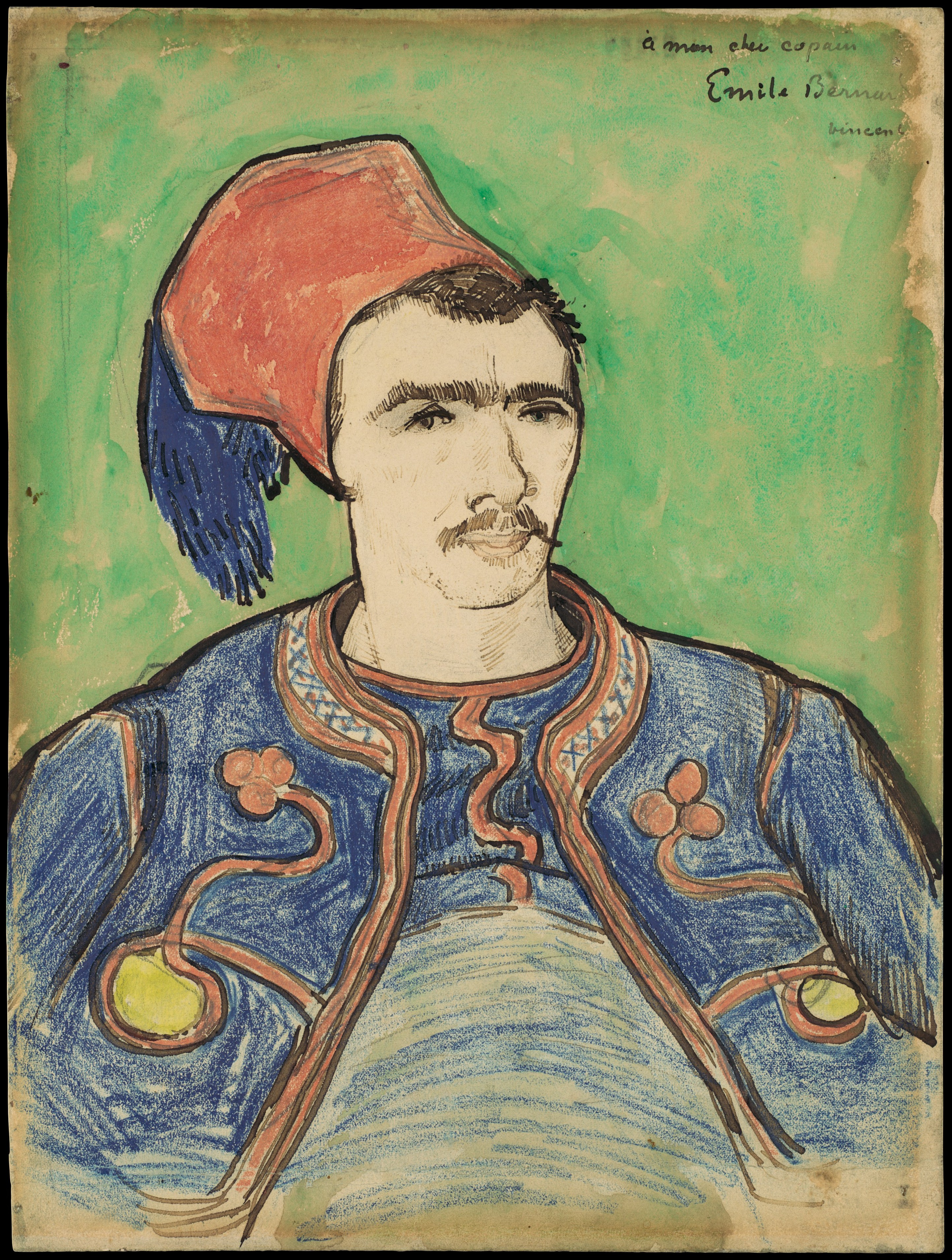 Drawing; Drawings